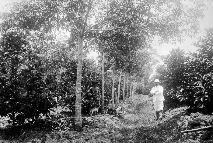 Foto. Jonge Liberia-koffie onder Hevea schaduwbomen op de Plantage Sorgvliet in Suriname